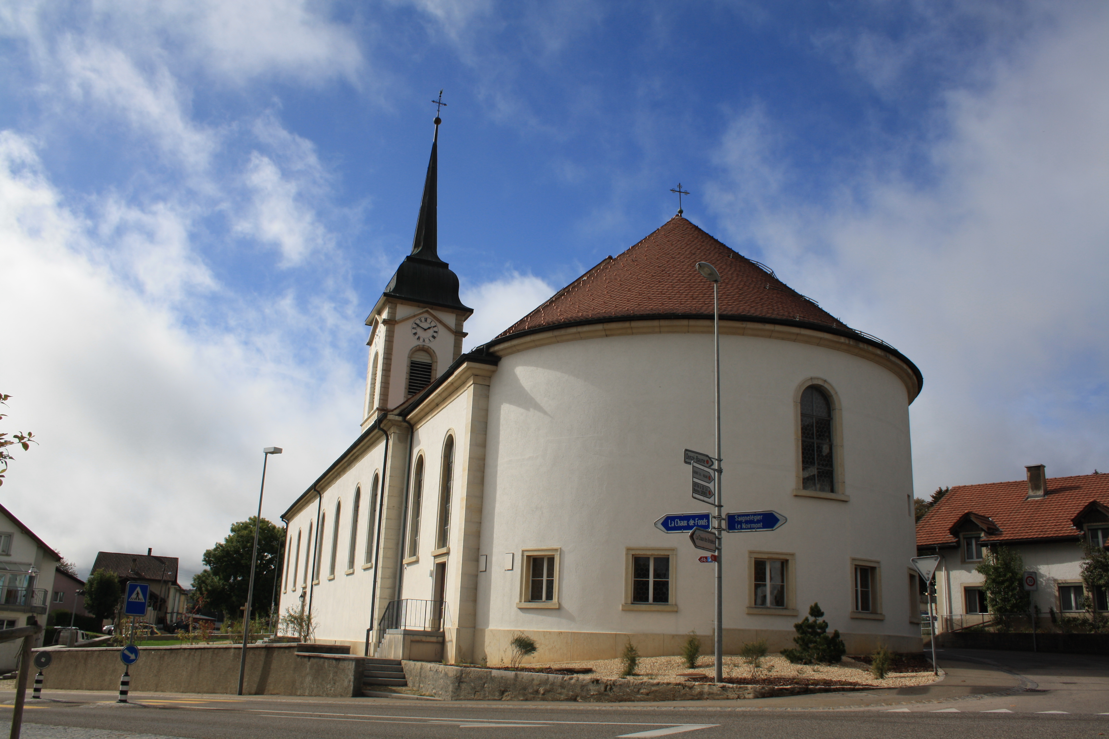 Les Breuleux